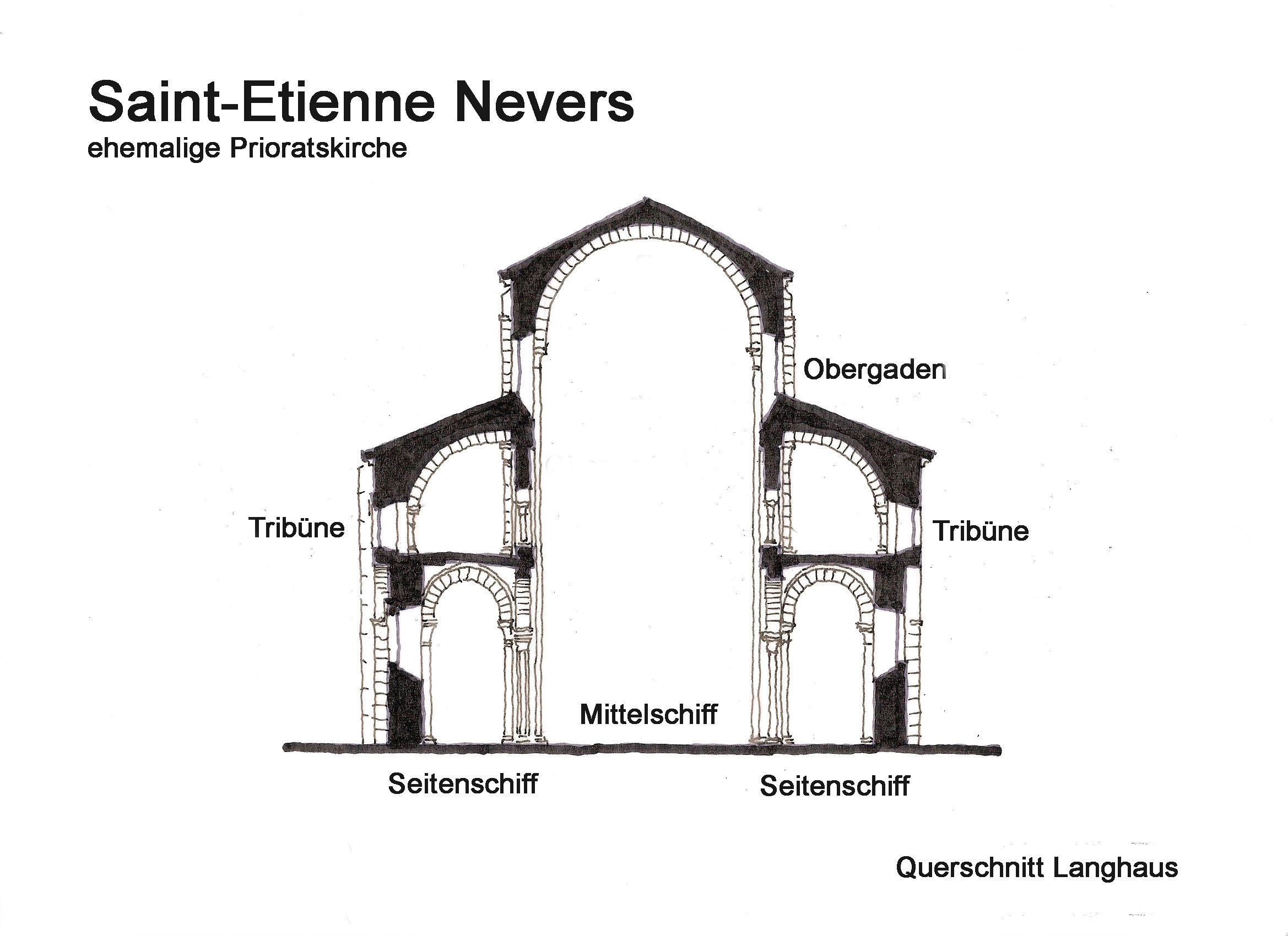 Saint-Etienne Nevers, Querschnitt